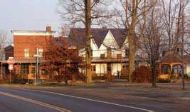 Le P'tit Bonheur de Saint-Camille. Photographie de Sylvain Laroche